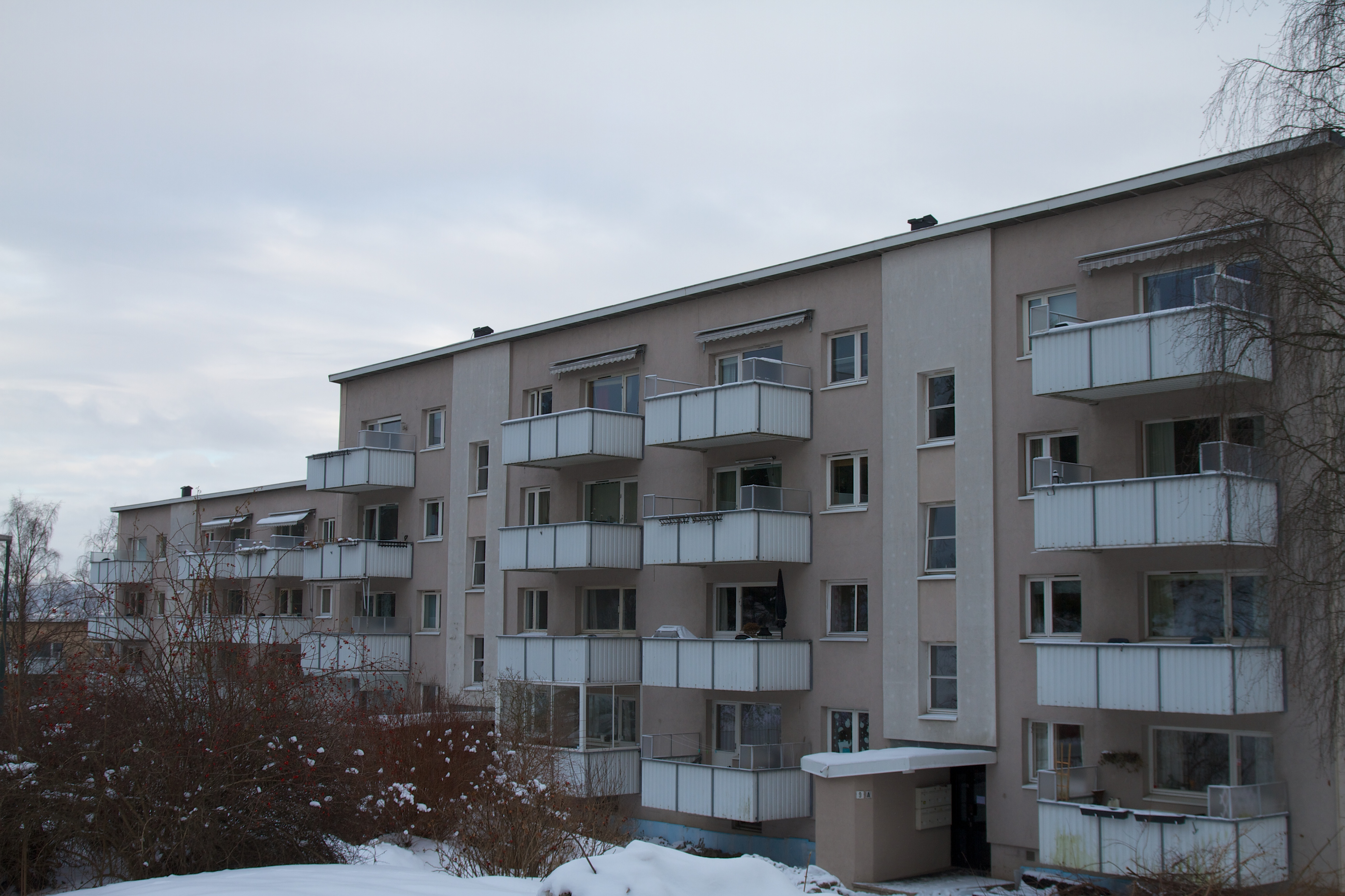 Fra Bratlikollen Boligsameie